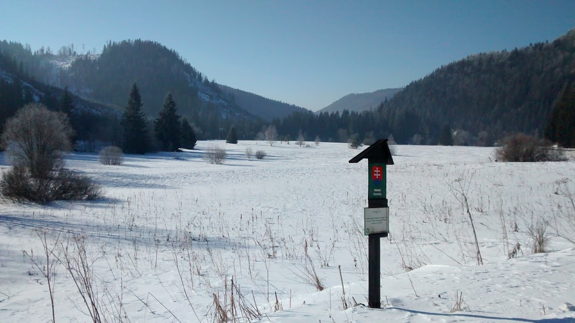 Meandre Hrona natuurgebied in de winter